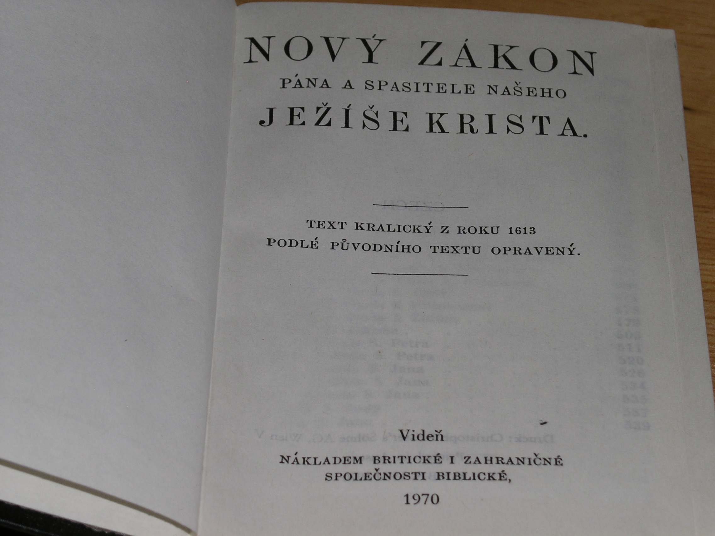 Nový zákon, text kralický 1613. Bible of Kralice